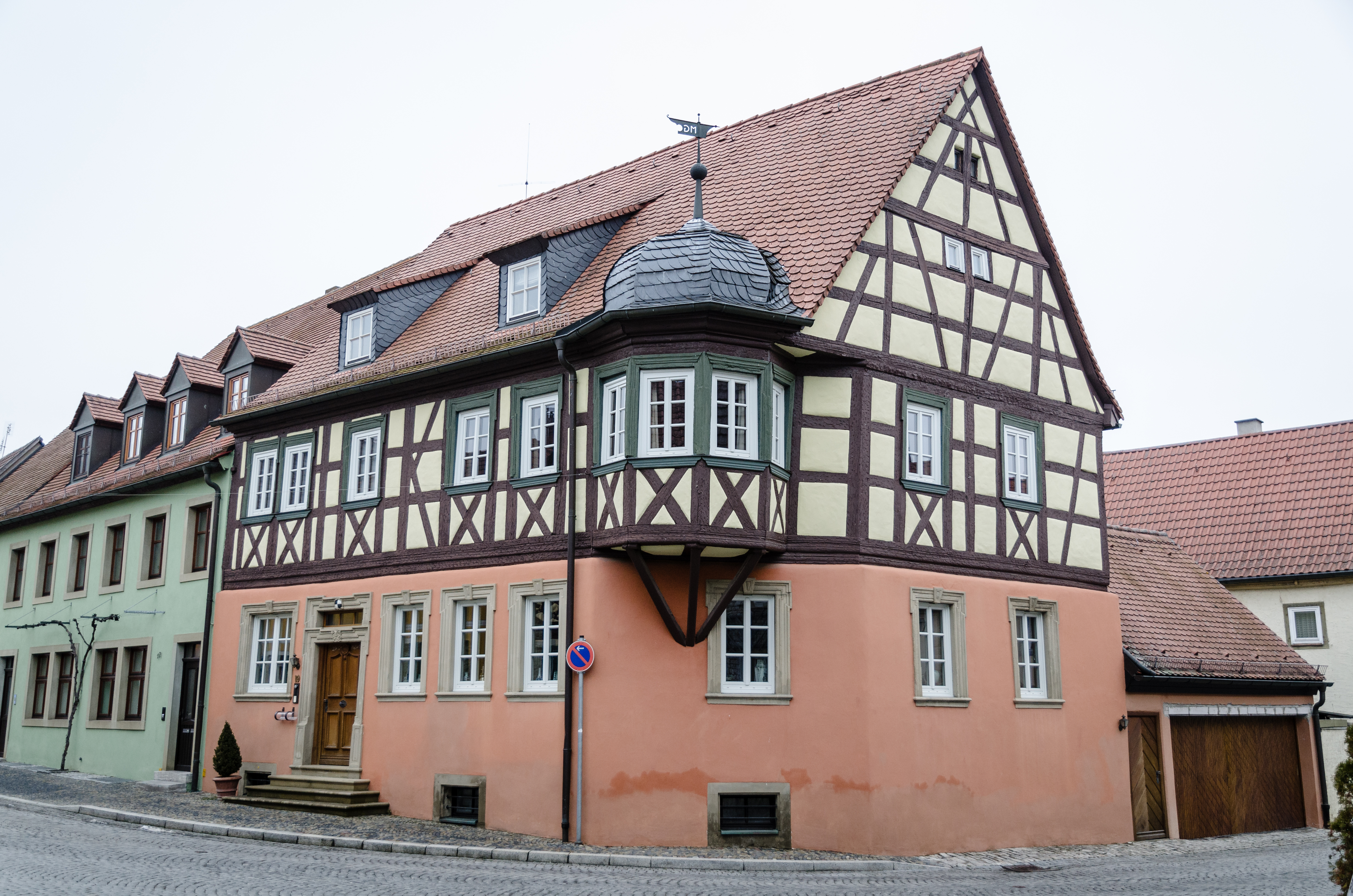 Prichsenstadt, Schmiedgasse 19